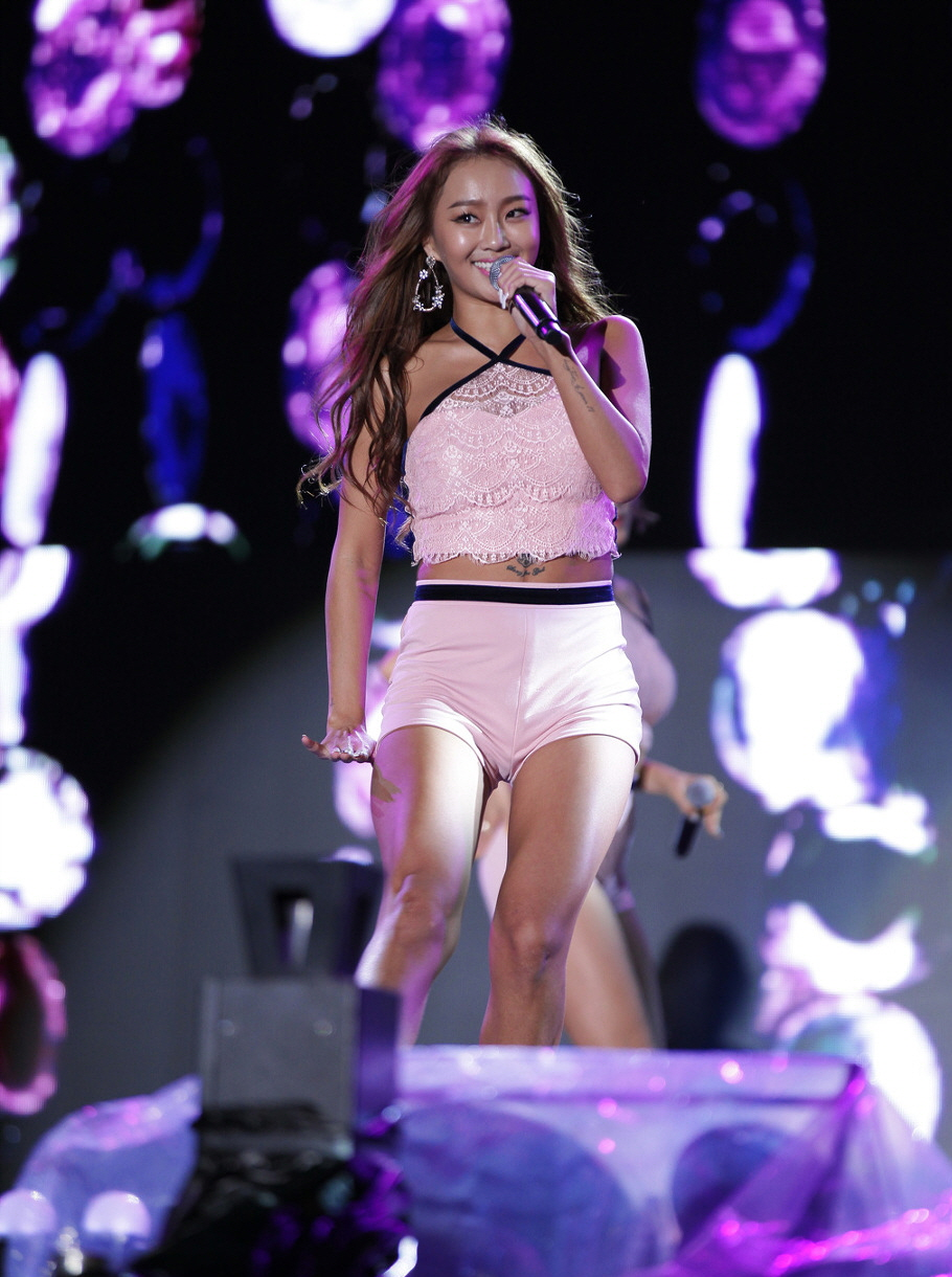 씨스타(SISTAR) G페스티벌 아시아 드림 콘서트